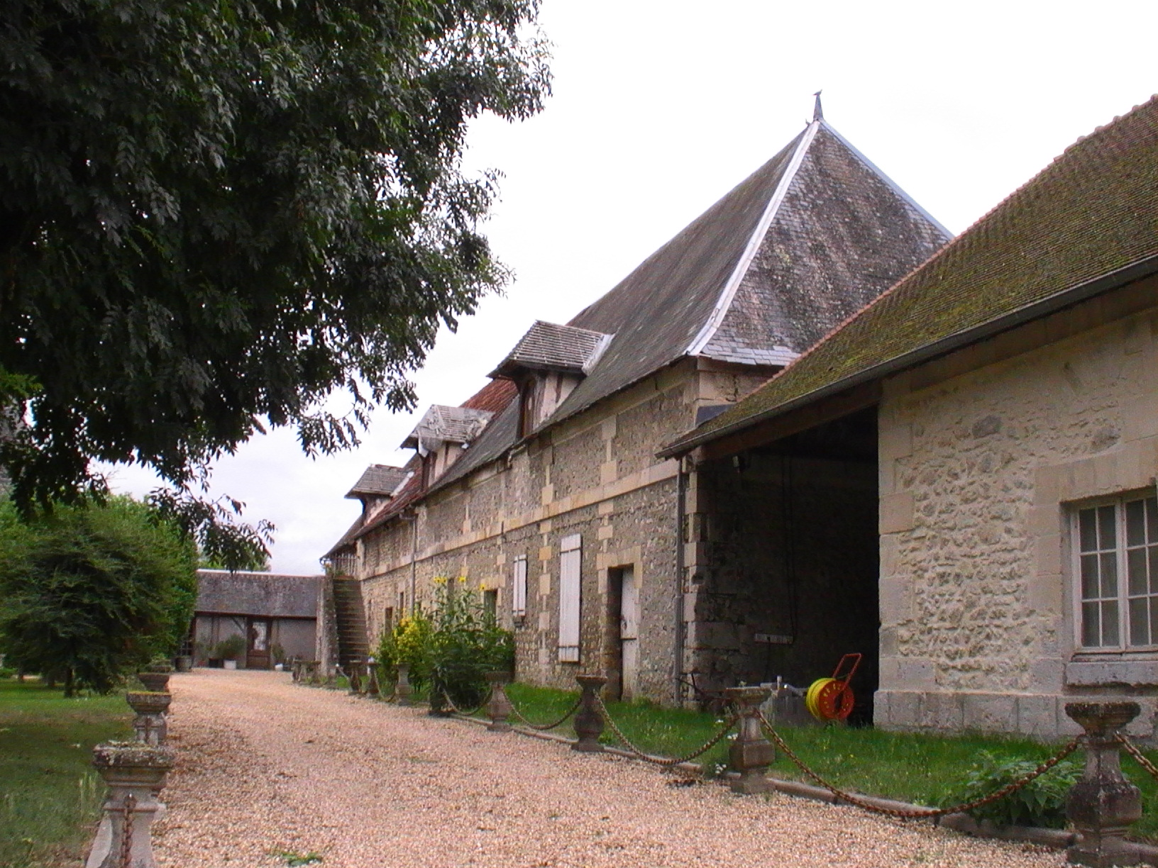 AUBEVOYE - Ancienne Chartreuse - Anciens bâtiments agricoles - 1